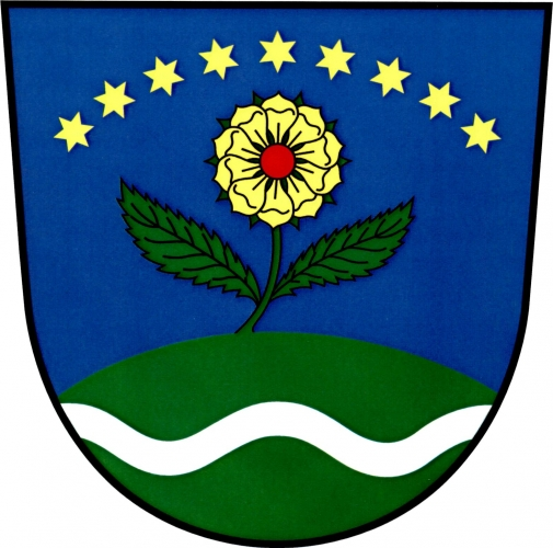 znak, Orlické Podhůří, okres Ústí nad Orlicí